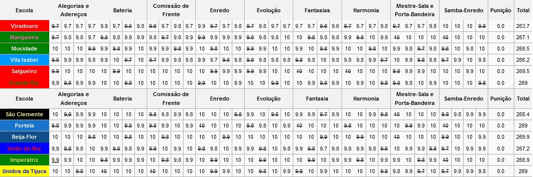 Resultados do Carnaval do Rio - 2015